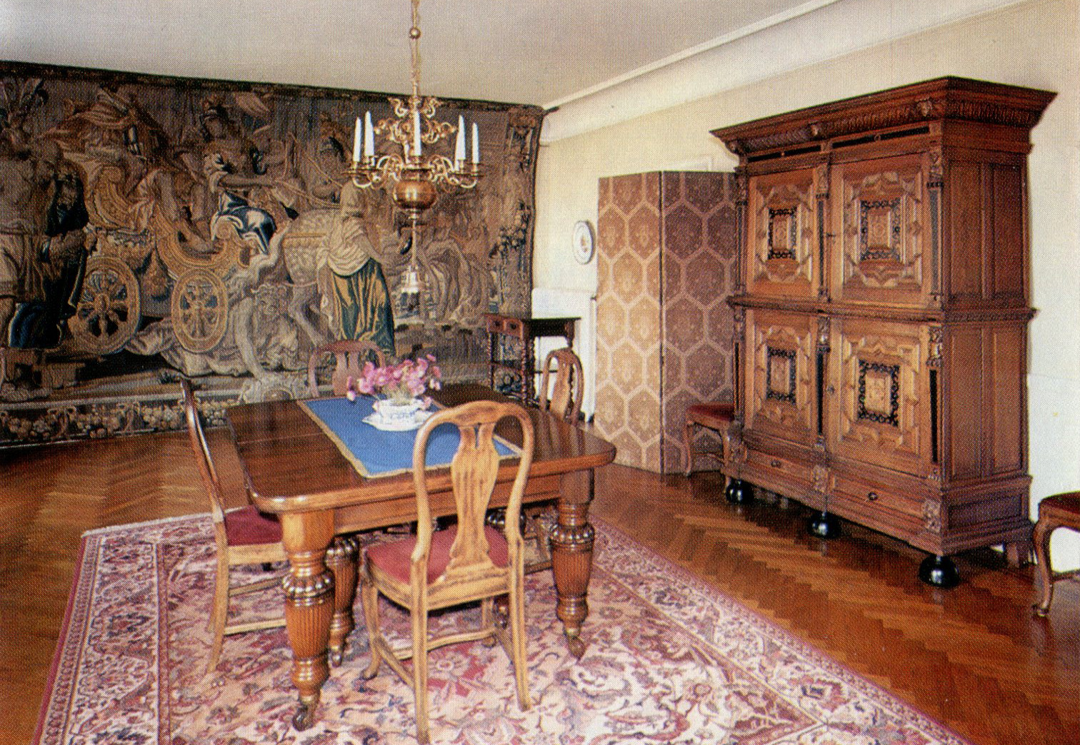 Hofsta säteri matsalen